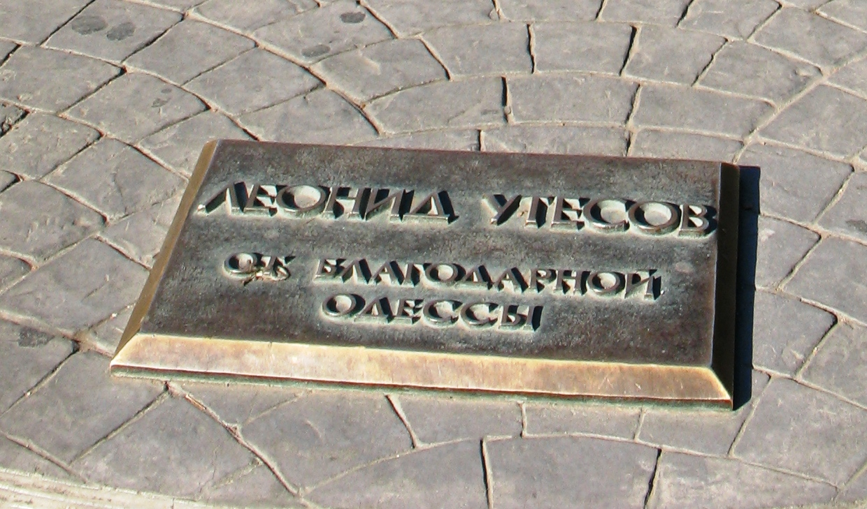 Табличка у памятника Утёсову в Одессе